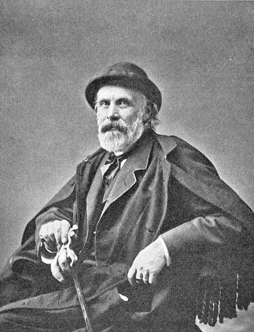 Lorenz Frølich (25. oktober 1820 i Hellerup - 25. oktober 1908 i København) var en dansk maler, tegner og grafiker